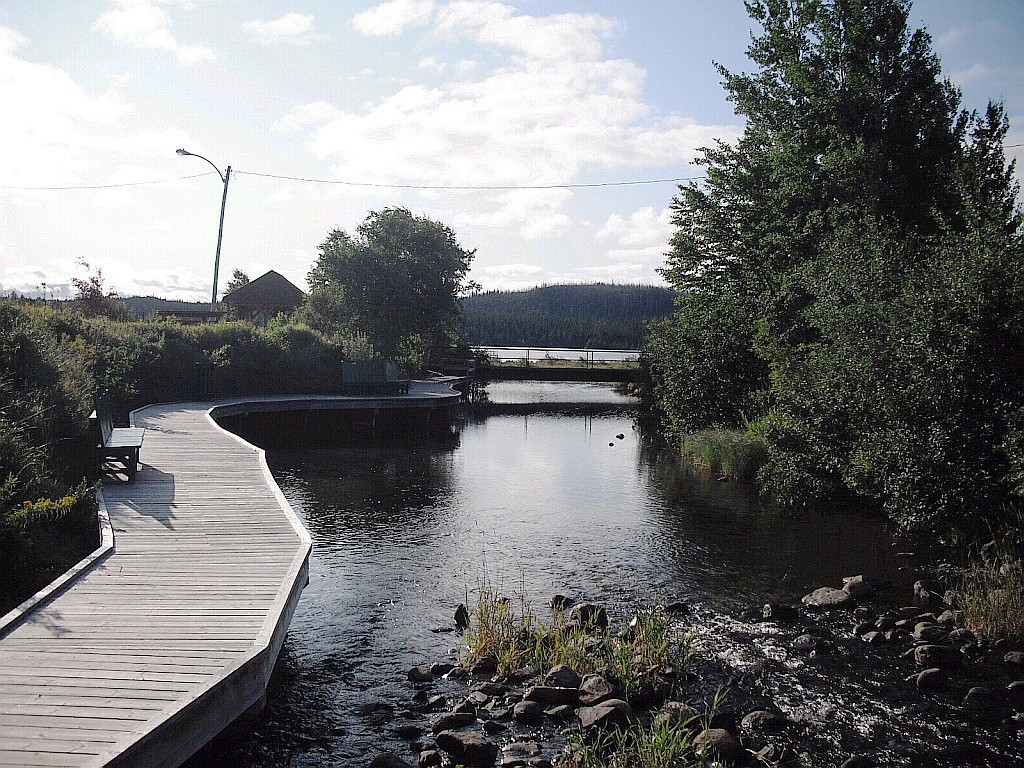 Vue sur le lac Gilman, au sud-est du secteur central de Chibougamau, dans la région du Nord-du-Québec.